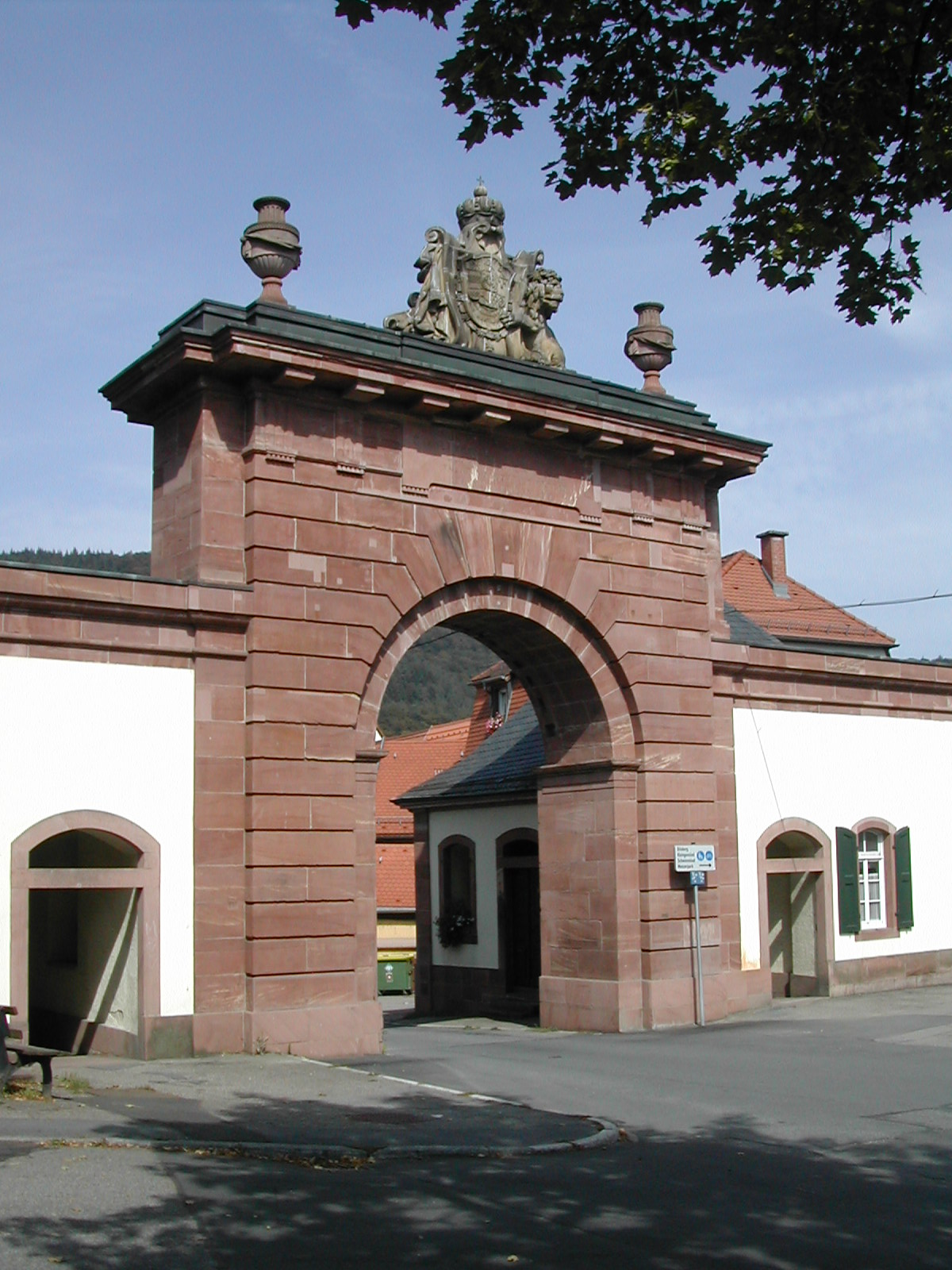 Stadttor in 69151 Neckargemünd/Germany